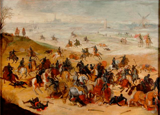 Battle of Lekkerbeetje, Vughterheide (Netherlands)label QS:Len,"Battle of Lekkerbeetje, Vughterheide (Netherlands)"label QS:Lnl,"Slag van Lekkerbeetje, Vughterheide (Nederland)"